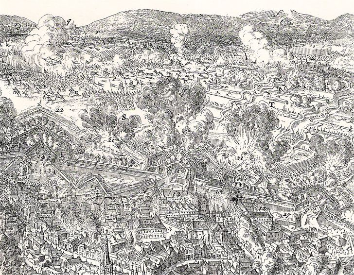 2. Wiener Türkenbelagerung